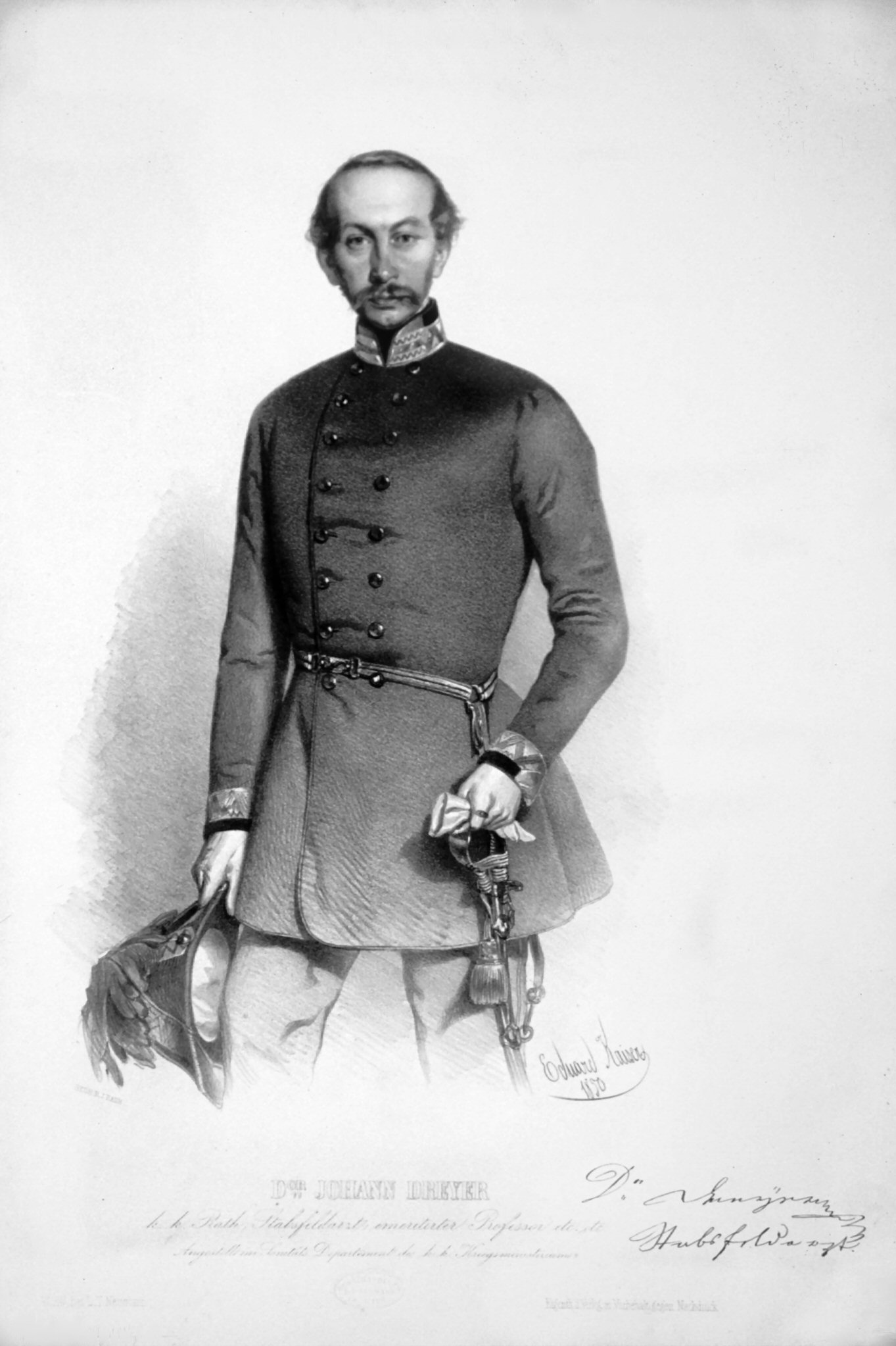 Johann Traugott Dreyer (1803-1871), Hofrat, Generalmajor, OPphthalmologe, oberster Feldarzt, Professor an der Josephs Akademie. Lithographie von Eduard Kaiser